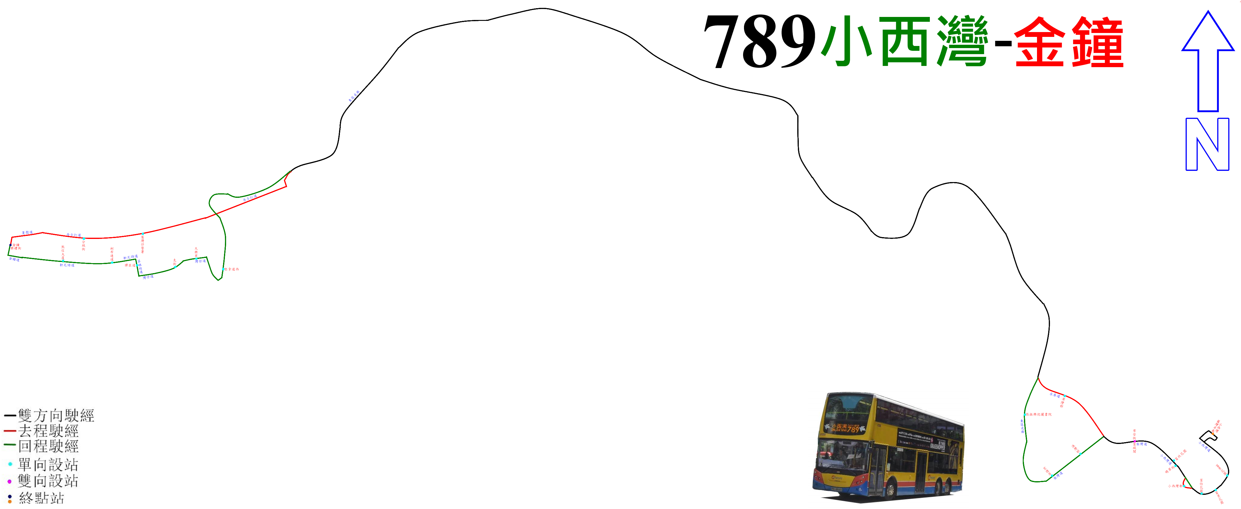 中文（香港）: 城巴789線的走線圖